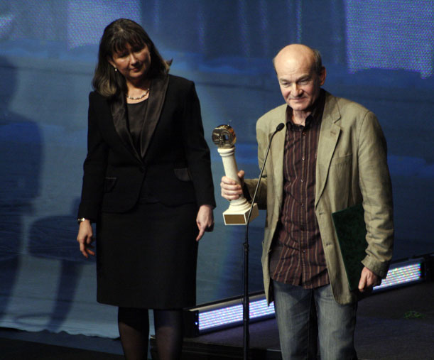 Almási Tamás (Székesfehérvár, 1948. július 26. –) Kossuth- és Balázs Béla-díjas magyar filmrendező, forgatókönyvíró, operatőr, a Színház- és Filmművészeti Egyetem tanára.